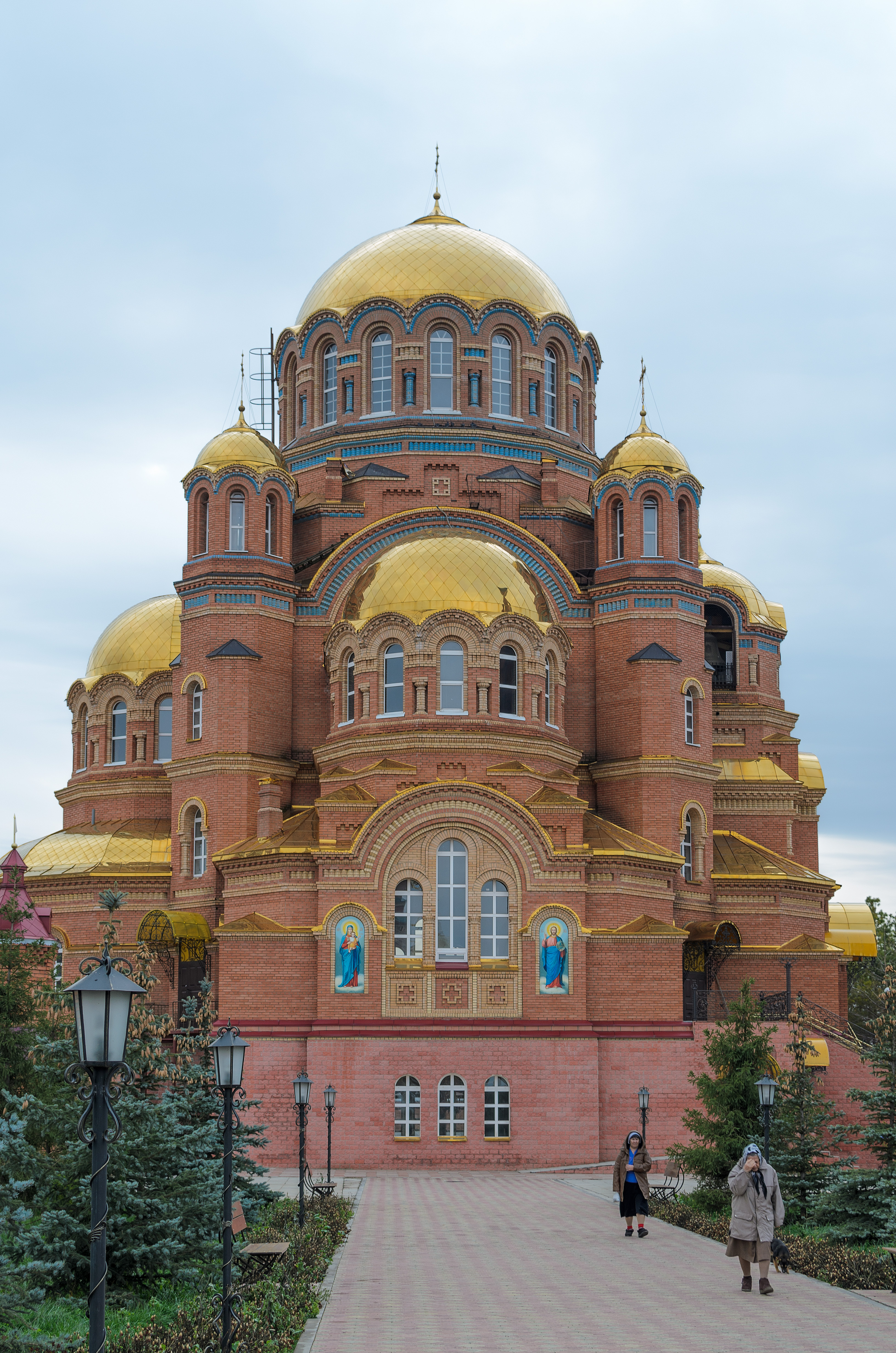 Свято-Троицкая обитель милосердия